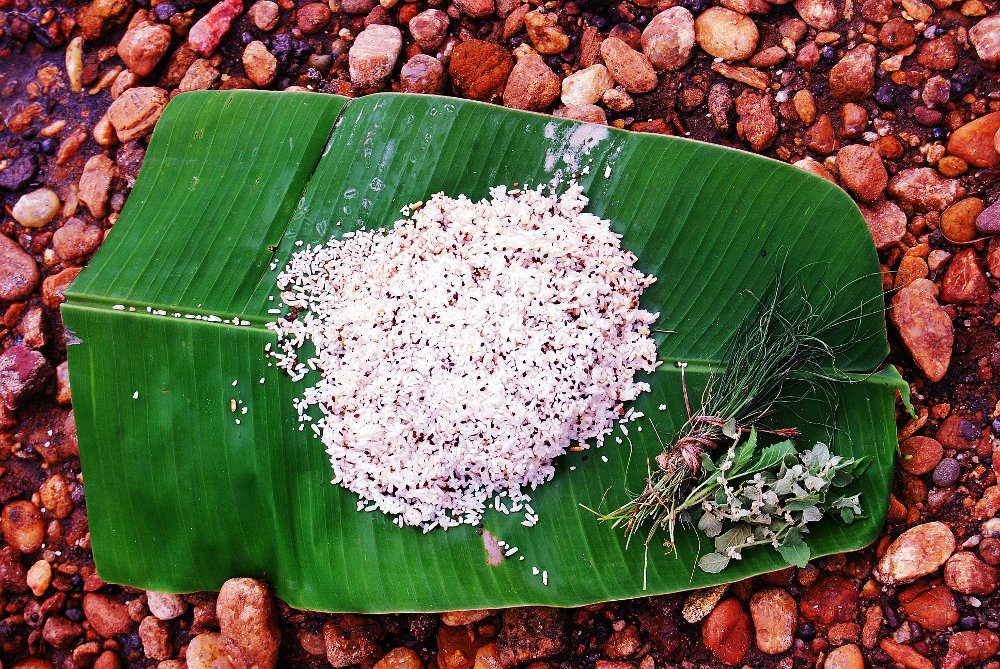 തർപ്പണത്തിന്‌ ഉപയോഗിക്കുന്ന പൂജാദ്രവ്യങ്ങൾ (അരി, കറുക പുല്ല്, എള്ള്, വാഴയില, ചെറൂള, തുളസി